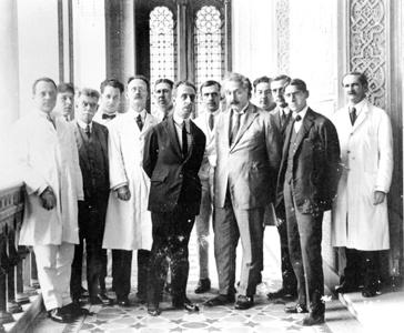 Carlos Chagas e médicos do Instituto Oswaldo Cruz, em recepção a Albert Einstein